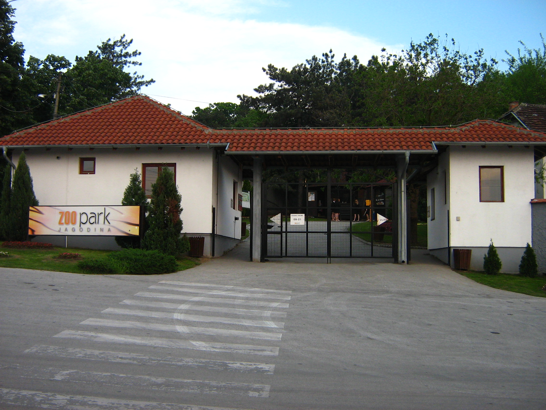 Улаз и зоолошки врт